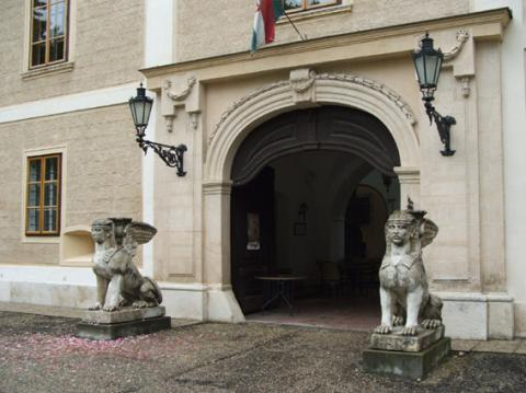 Hédervár, hungary